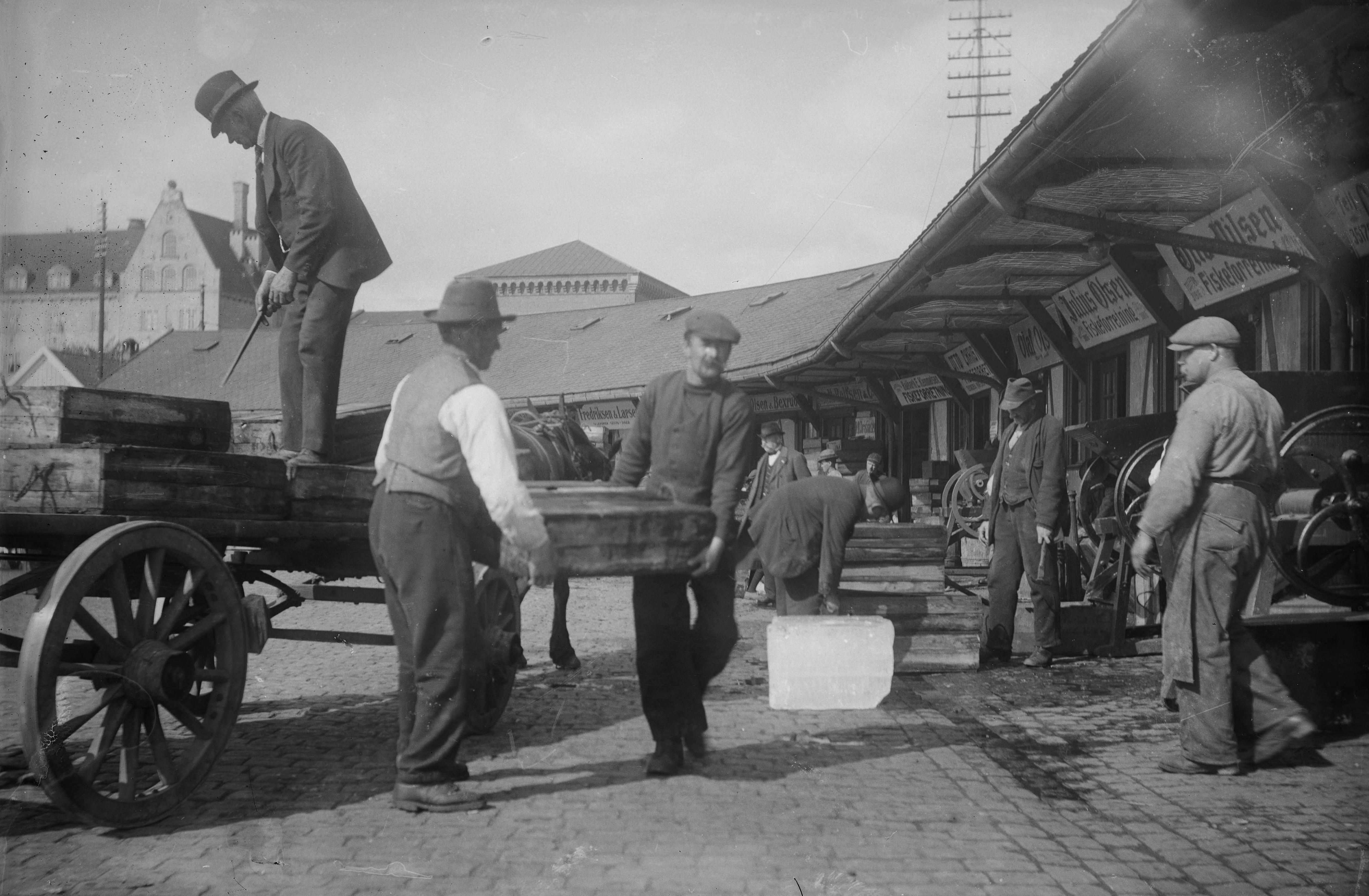 Den gamle fiskehallen fra 1905 på Vippetangen i Oslo